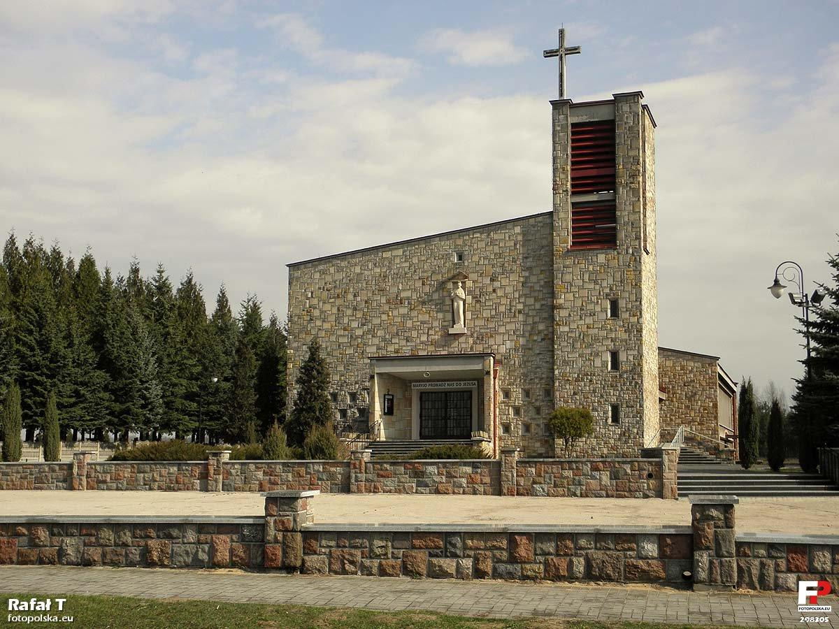 Kościół Wniebowzięcia NMP.